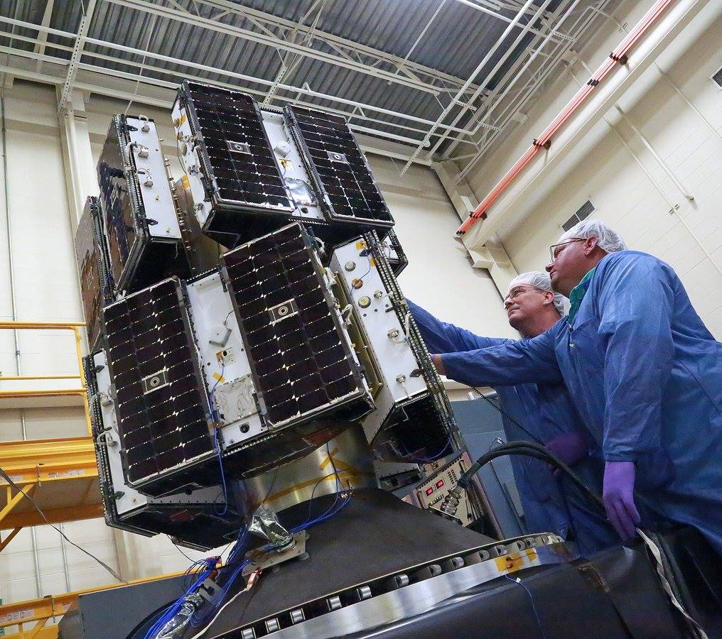 Les 8 satellites CYGNSS de la NASA sur leur dispenseur peut avant leur lancement